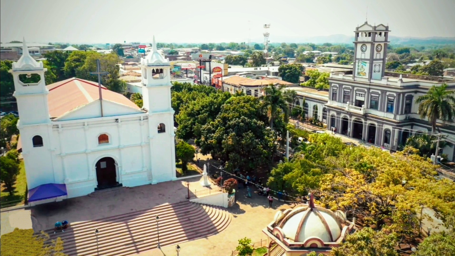 Parque central de Usulután